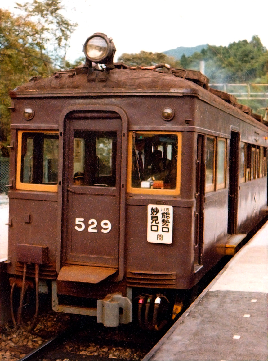 能勢電鉄500型電車（元ja:阪急500形電車）。1979年5月にBergmannがja:妙見口駅で銀塩フィルムカメラで撮影したものを、2010年5月31日に同人がスキャンし、同日に日本語版ウィキペディアへアップロード。